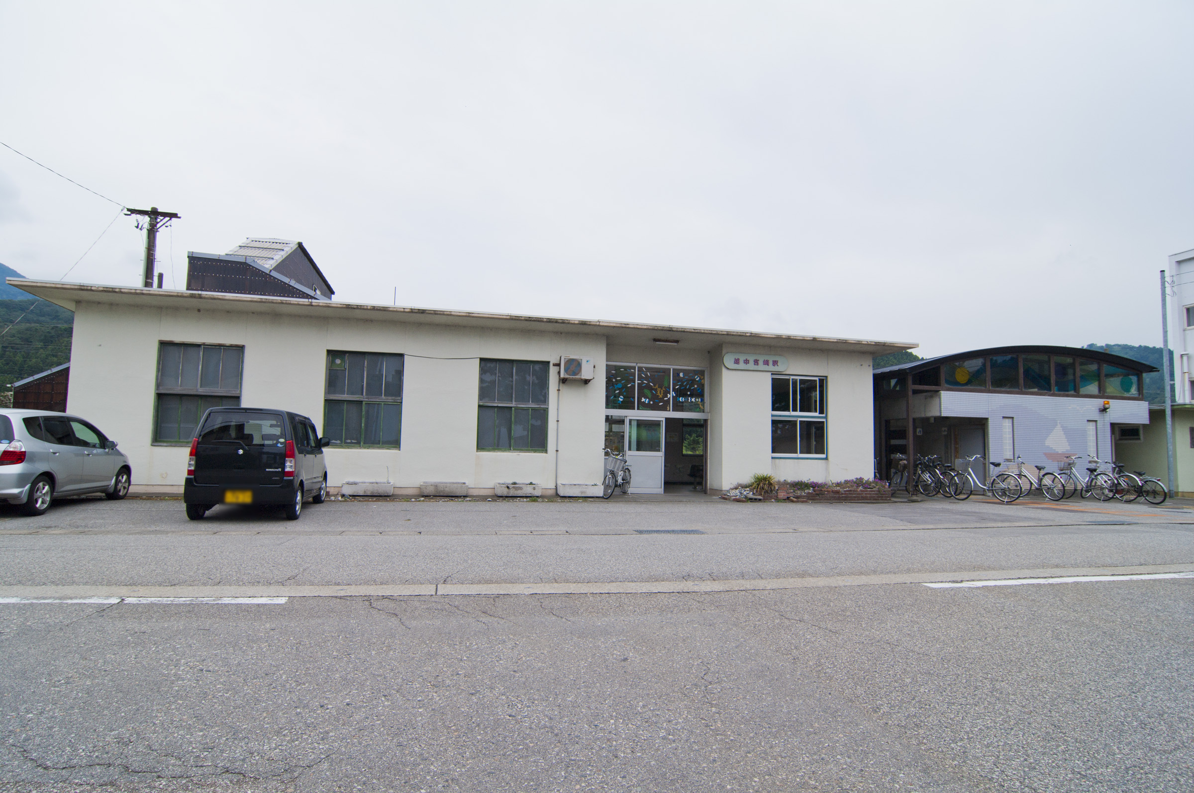 西日本旅客鉄道株式会社北陸本線越中宮崎駅